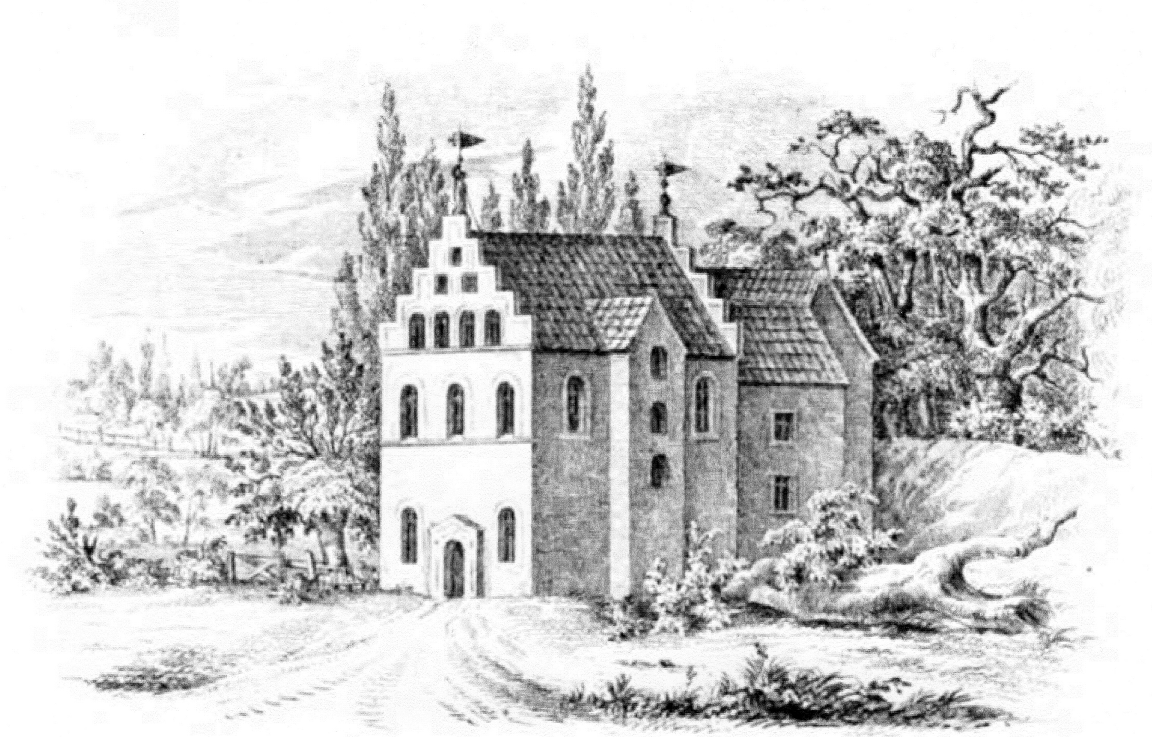 Herrenhaus Arlewatt , Zeichnung von Köhler und Roisternitz 1862